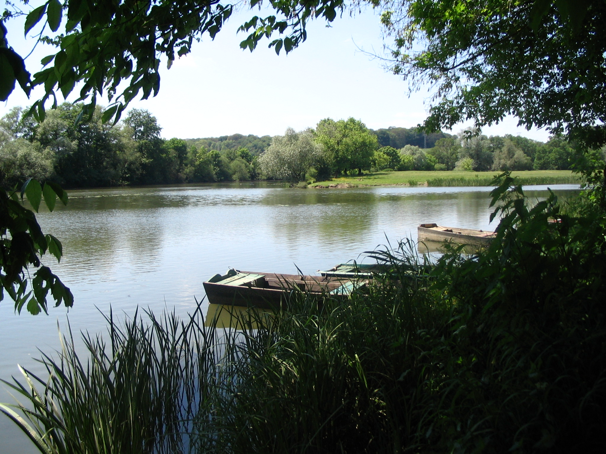 La Saône à Bucey